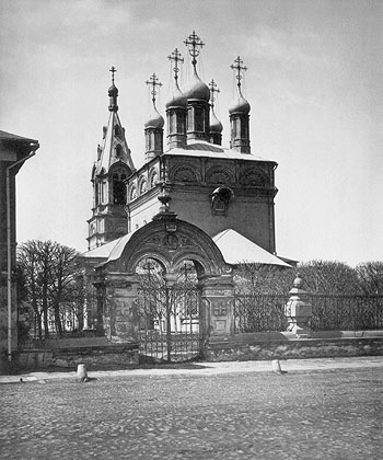 Church of St. Nicholas in Pupyshi, Zamoskvorechye, Moscow. Built 1686, destroyed 1930sМосква, Замоскворечье. Церковь Николая Чуд., что на Пупышахъ (Божiей Матери иконы "Утоли моя печали") на берегу Москвы р. - Пр. 3: Б. М. Утоли моя печали, Смоленской Б. М. и Николая Чуд. - Зн. въ 1625 г. (въ 1686 г. дерев.).